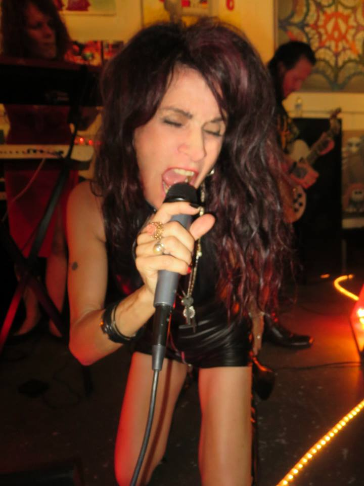 Gitane Caliente